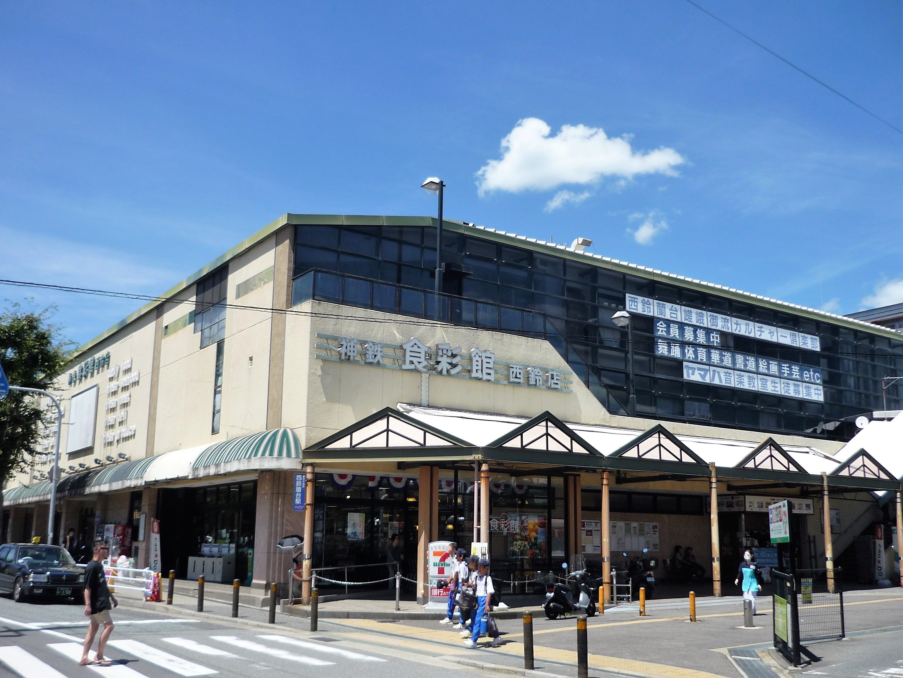 神鉄食彩館 西鈴蘭台店